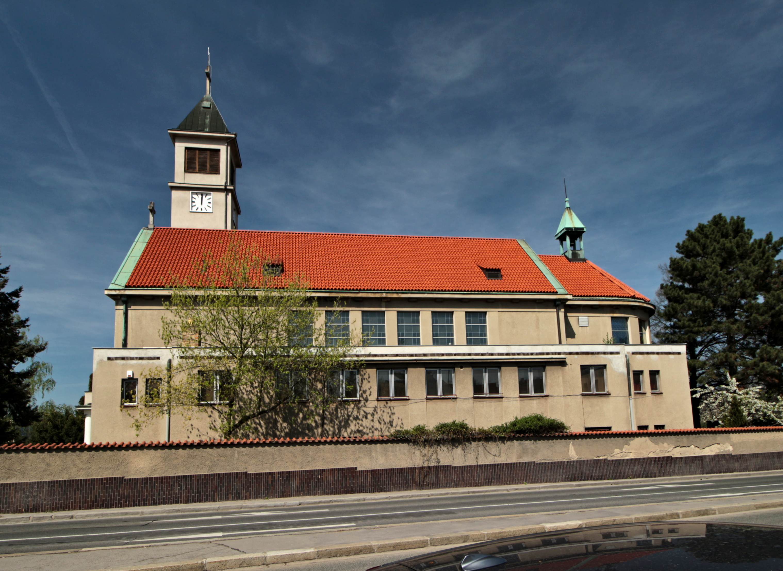 Kostel Panny Marie Královny míru, Praha 4-Lhotka